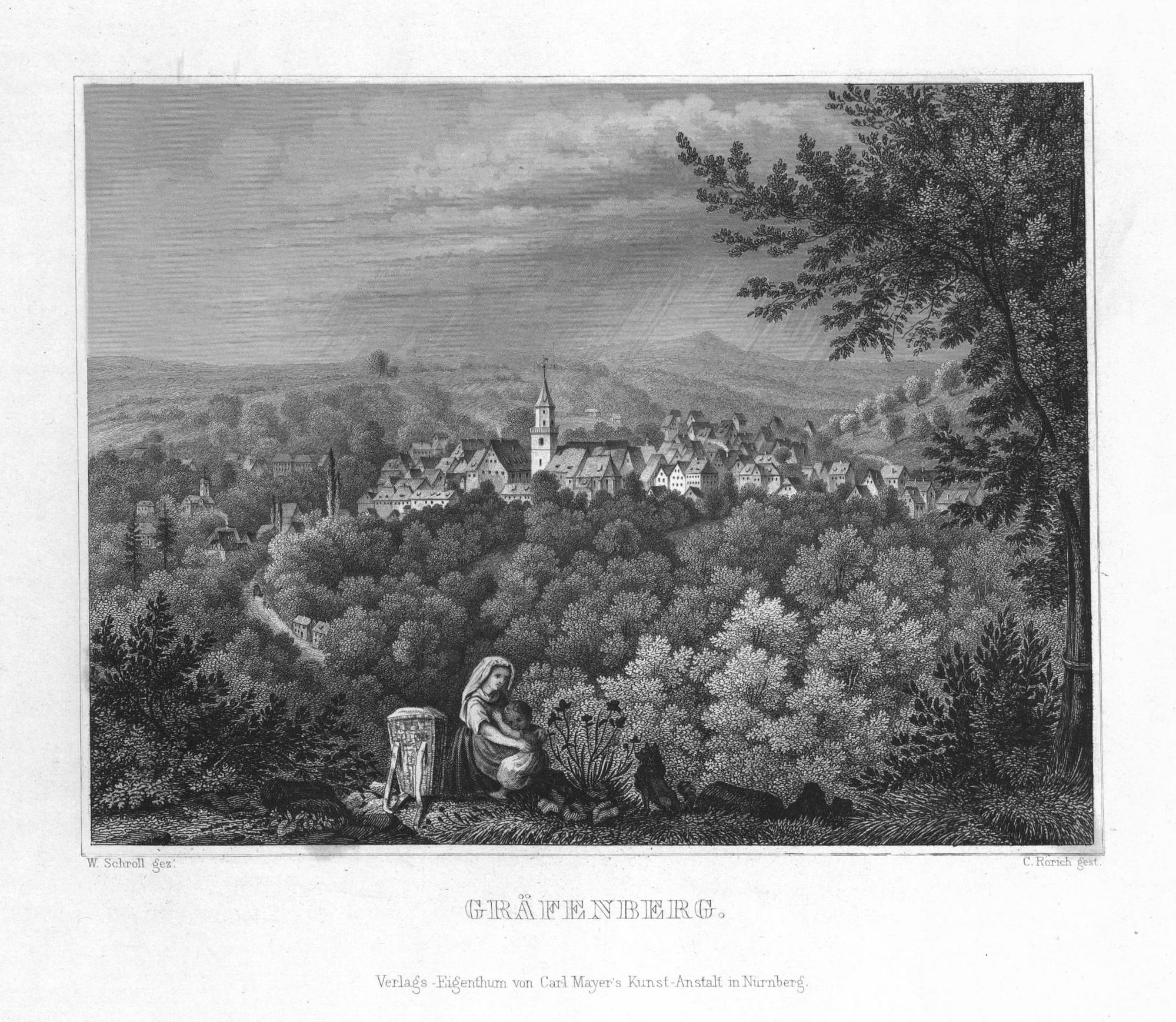 Gräfenberg